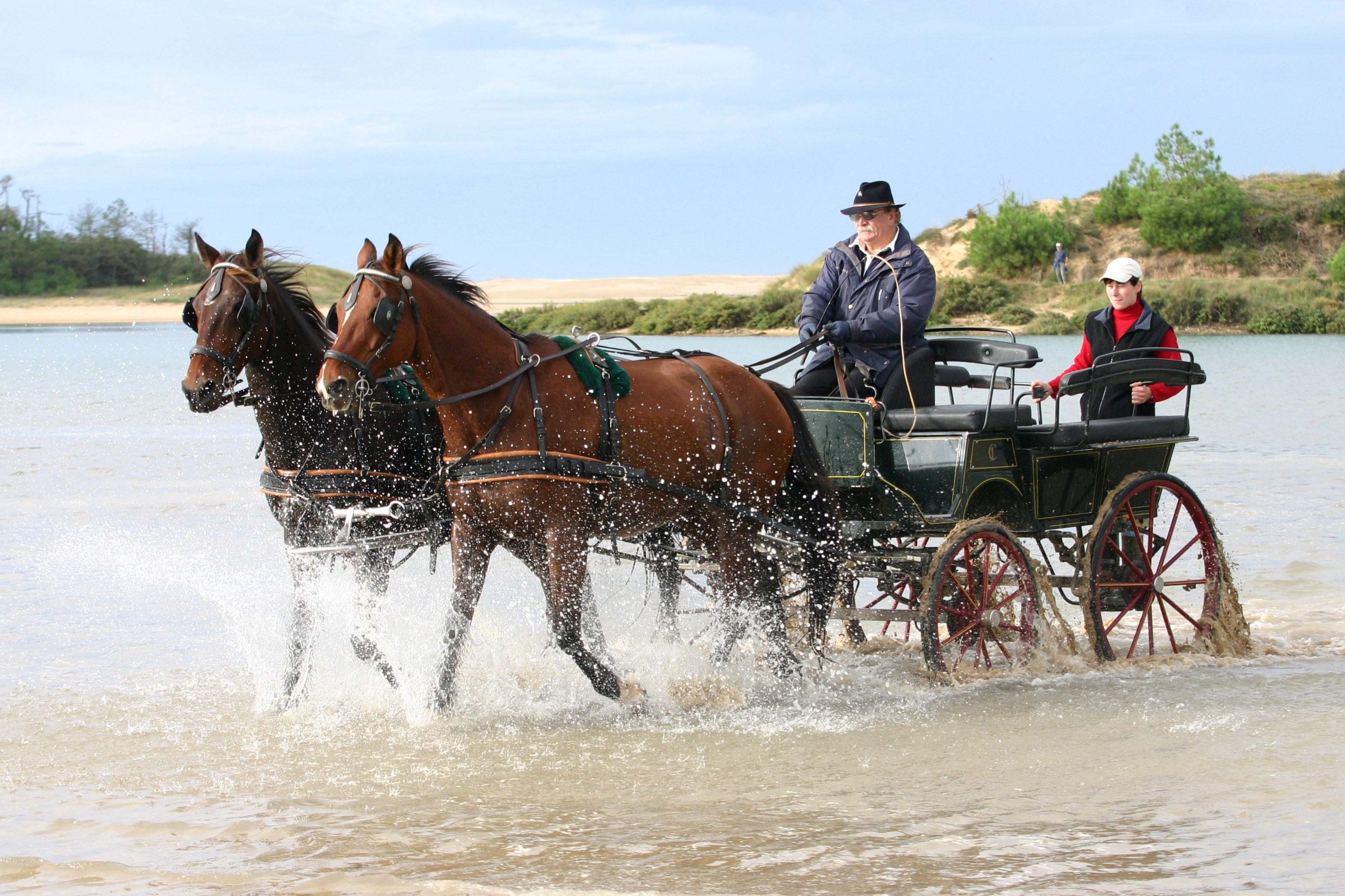 Le bonheur en attelage en paire en Vendée.